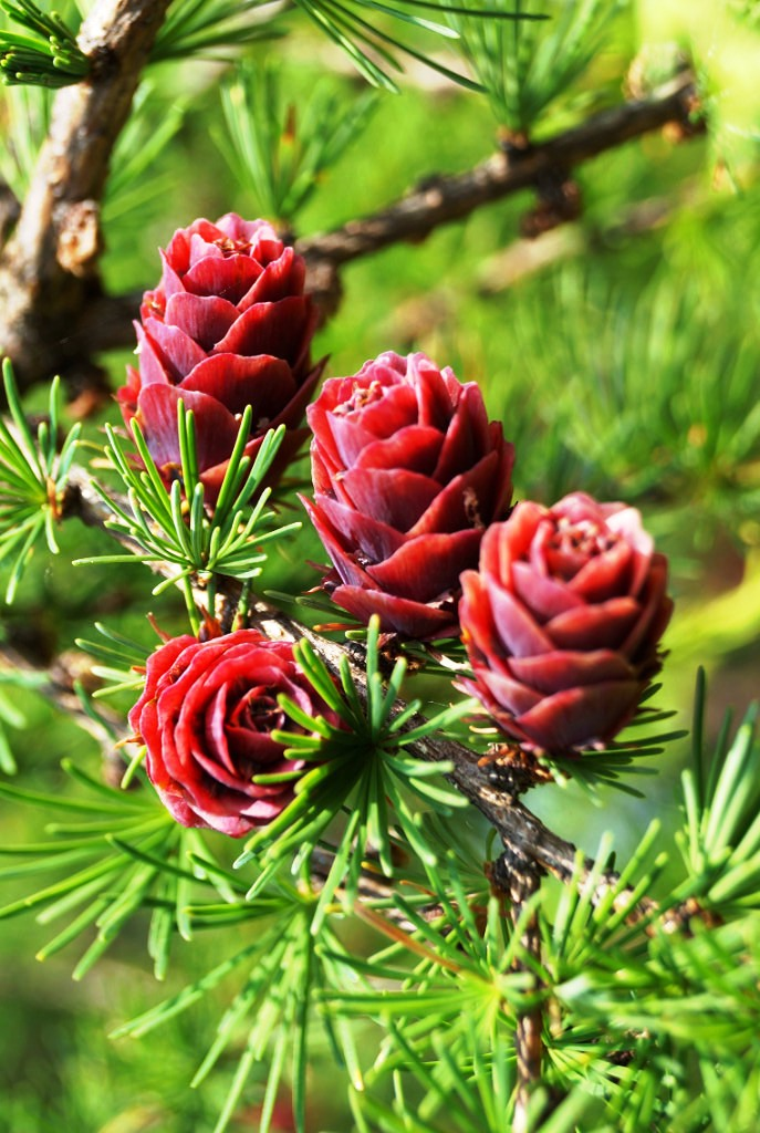 Шишки лиственницы летом